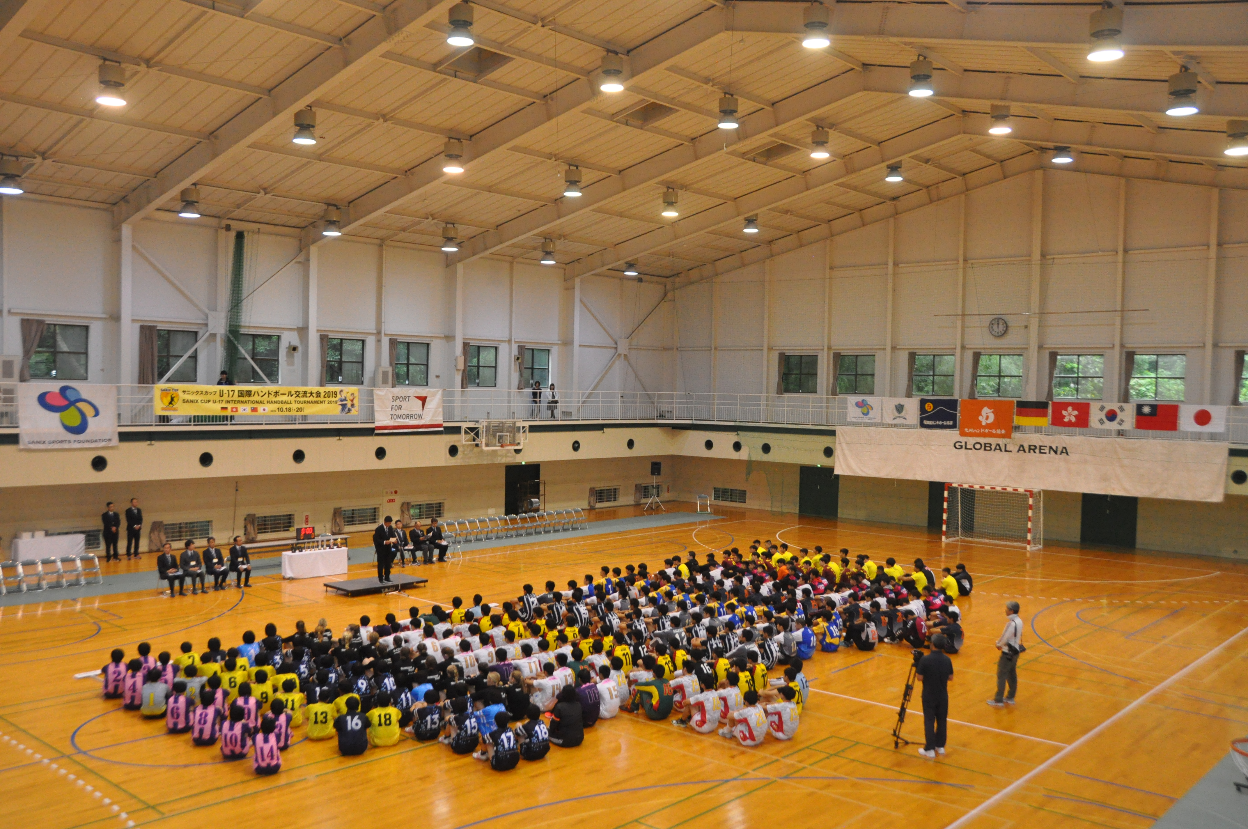 サニックスカップU-17国際ハンドボール交流大会2019の開会式の様子